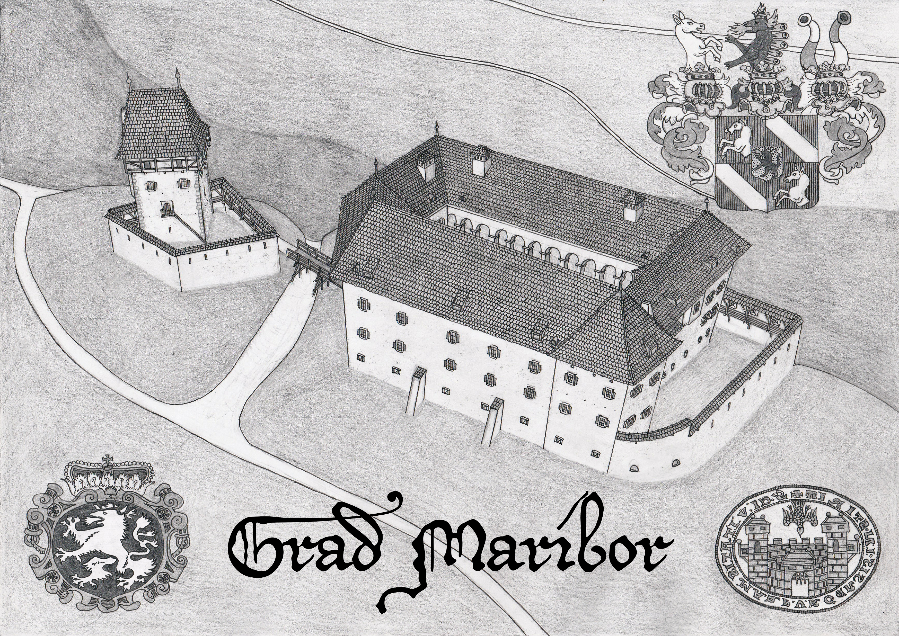 Poskus rekonstrukcije Stari Grad Maribor iz 16.stol. Zgoraj desno je grb lastnika Gallus von Racknitz (1590–1658). Spodaj desno je upodobitev pečata mesta Maribor. Spodaj levo je upodobitev grba Štajerske krajine.